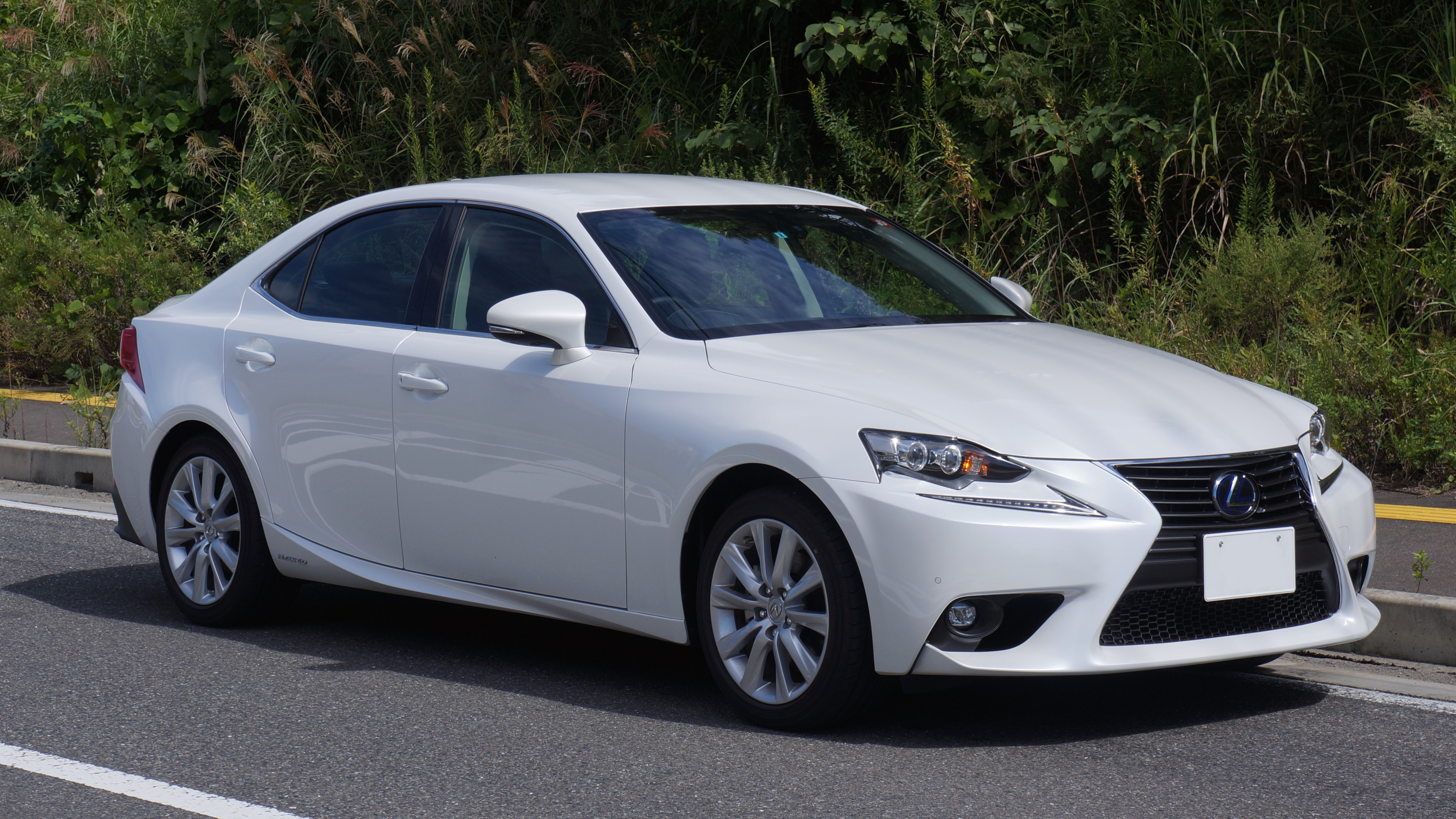 Lexus IS300h 2015 japan front